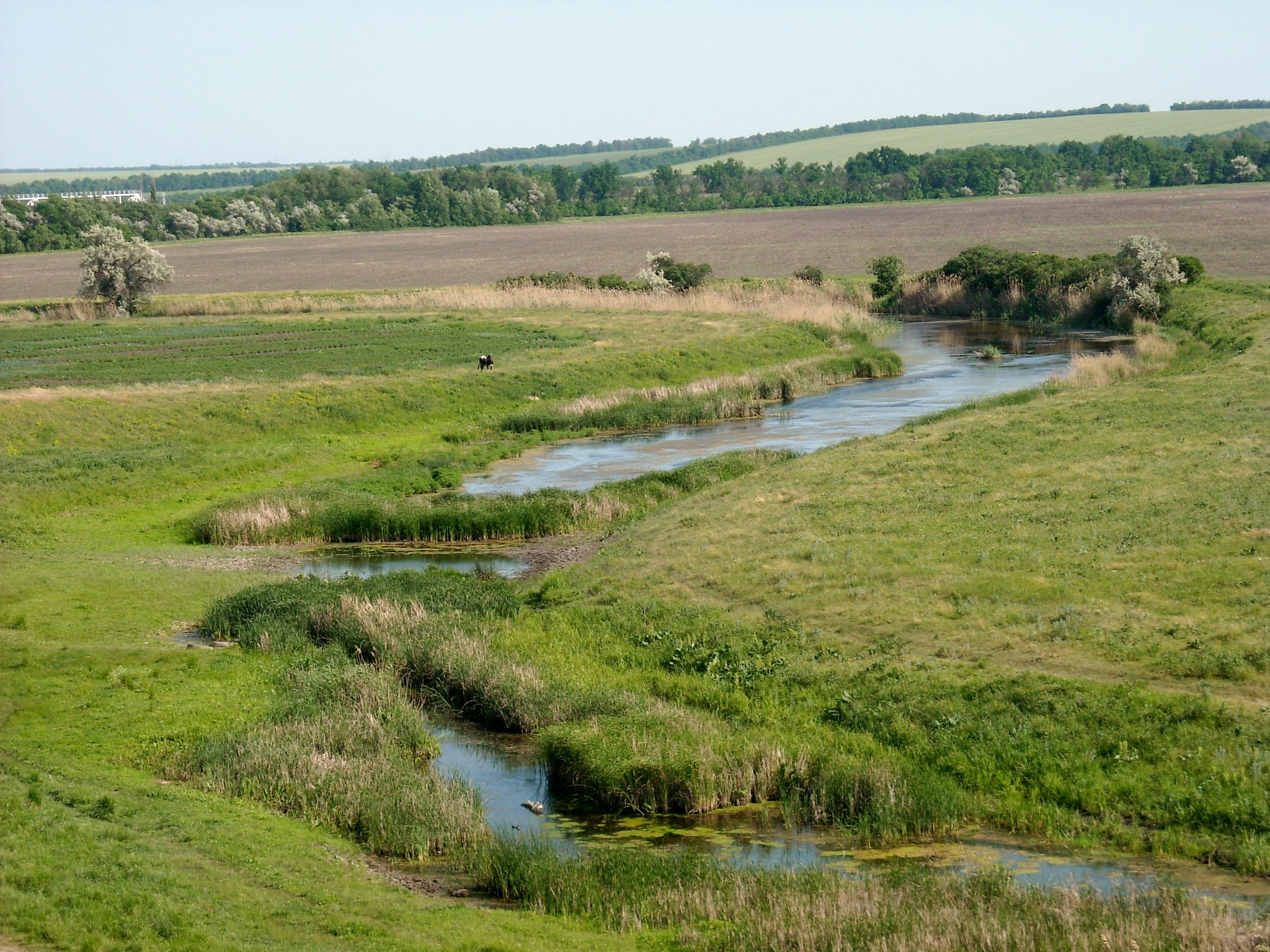 Местность между Привольным и Жданово